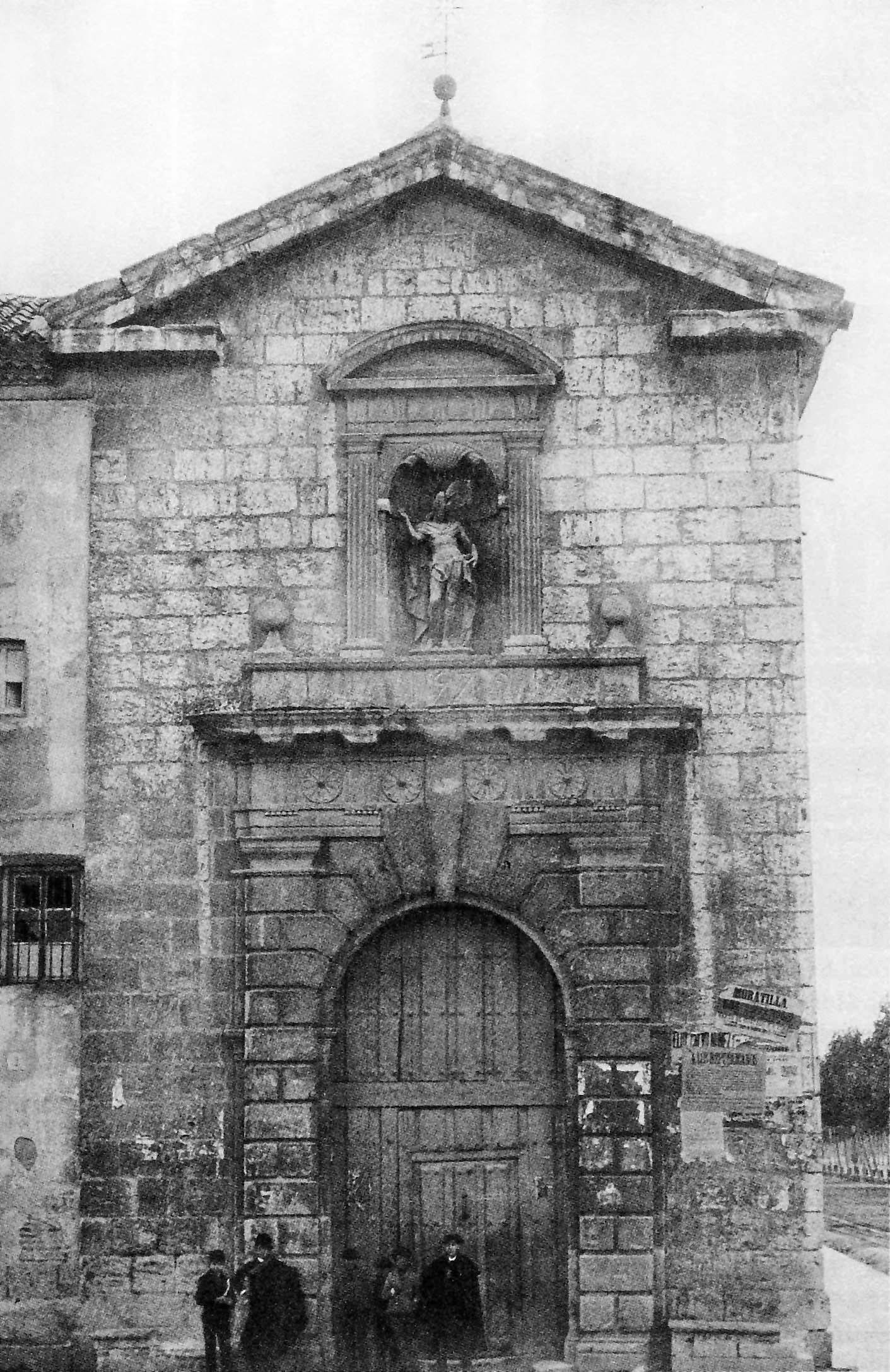 Fachada y portada del edificio desaparecido Hospital de la Resurrección en la ciudad de Valladolid, España. Fotografía realizada por Adolfo Eguren en 1890 a petición de la “Comisión de Monumentos históricos y artísticos de la provincia”.